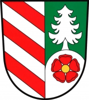 Těškov, znak. Ve stříbrno-zeleně polceném štítě vpravo tři červená kosmá břevna, vlevo stříbrný smrk vyrůstající ze stříbrného vrchu, v něm červená růže se zlatým semeníkem.